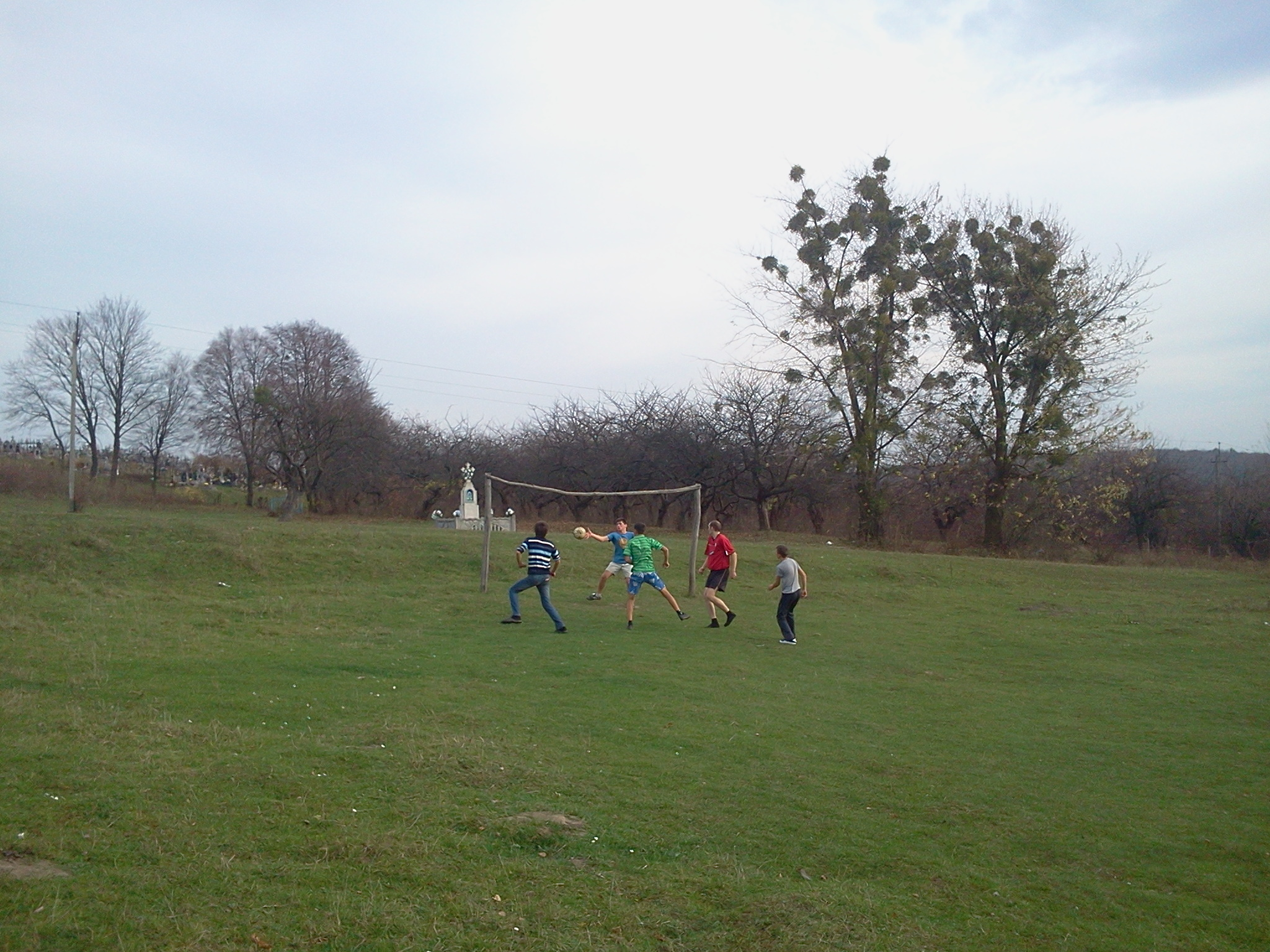 Стадіон Кульматичі